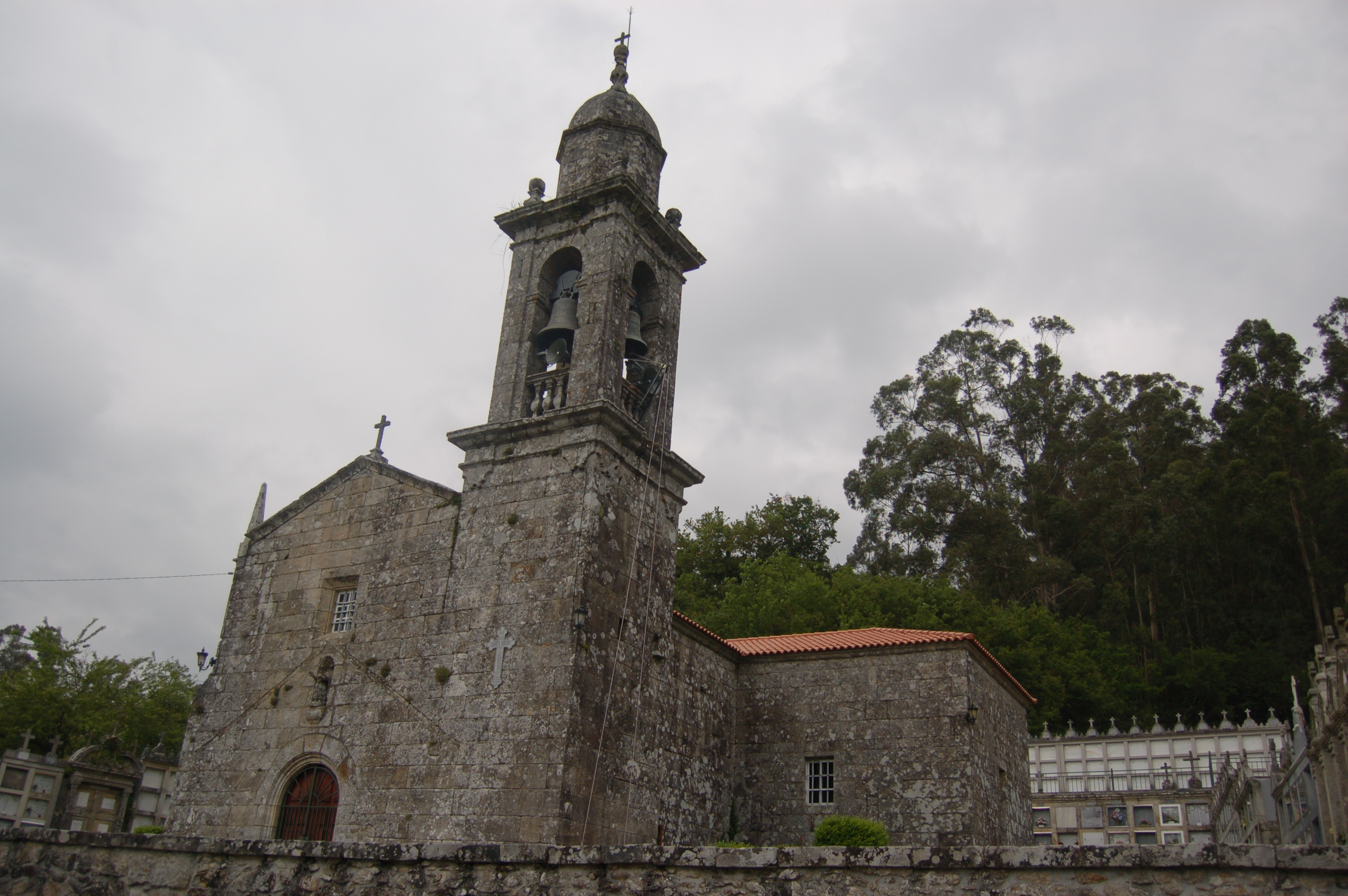 Igrexa parroquial de San Martiño de Laxe (Moraña)